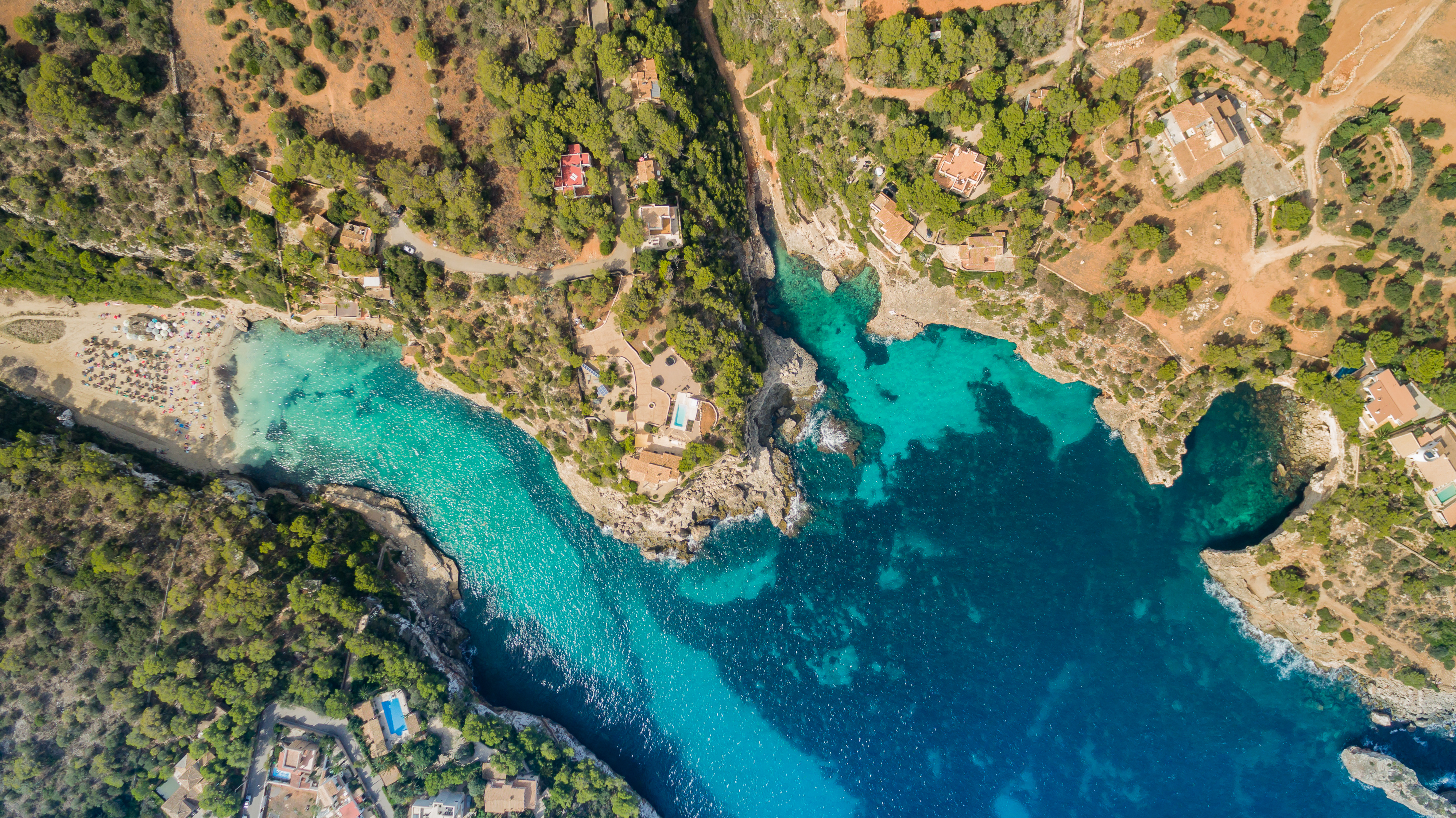 Mallorca schönste Strände Westküste Bucht